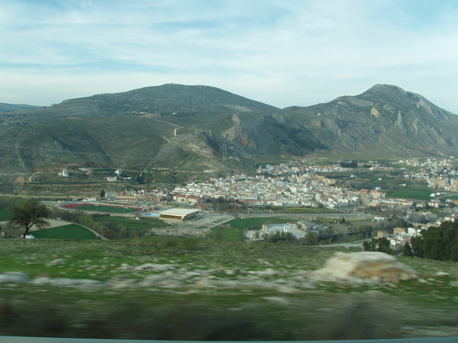 Las Alpujarras Granada, España-Spain.